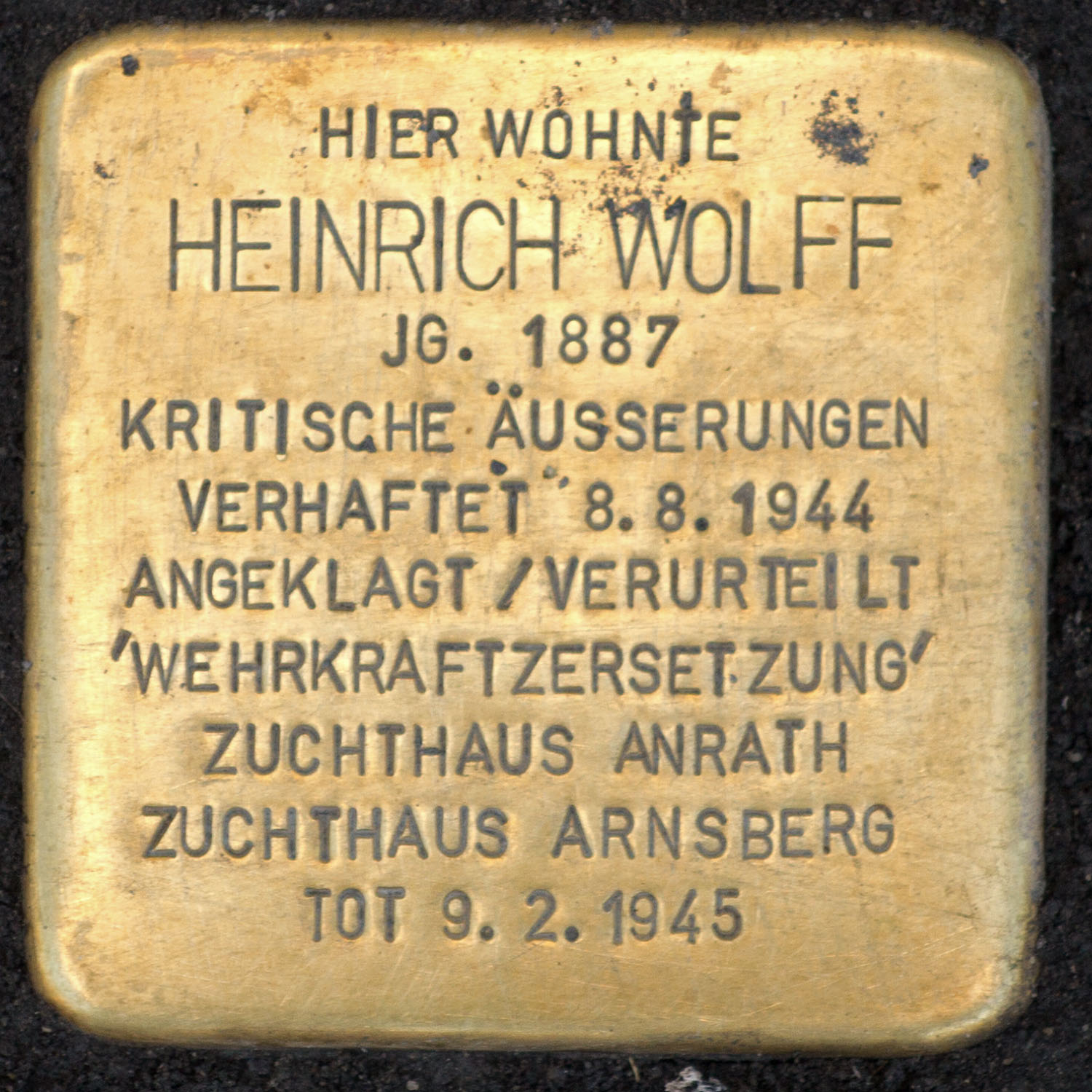 Stolpersteine in Kempen: Heinrich Wolff, Peterstr. 3